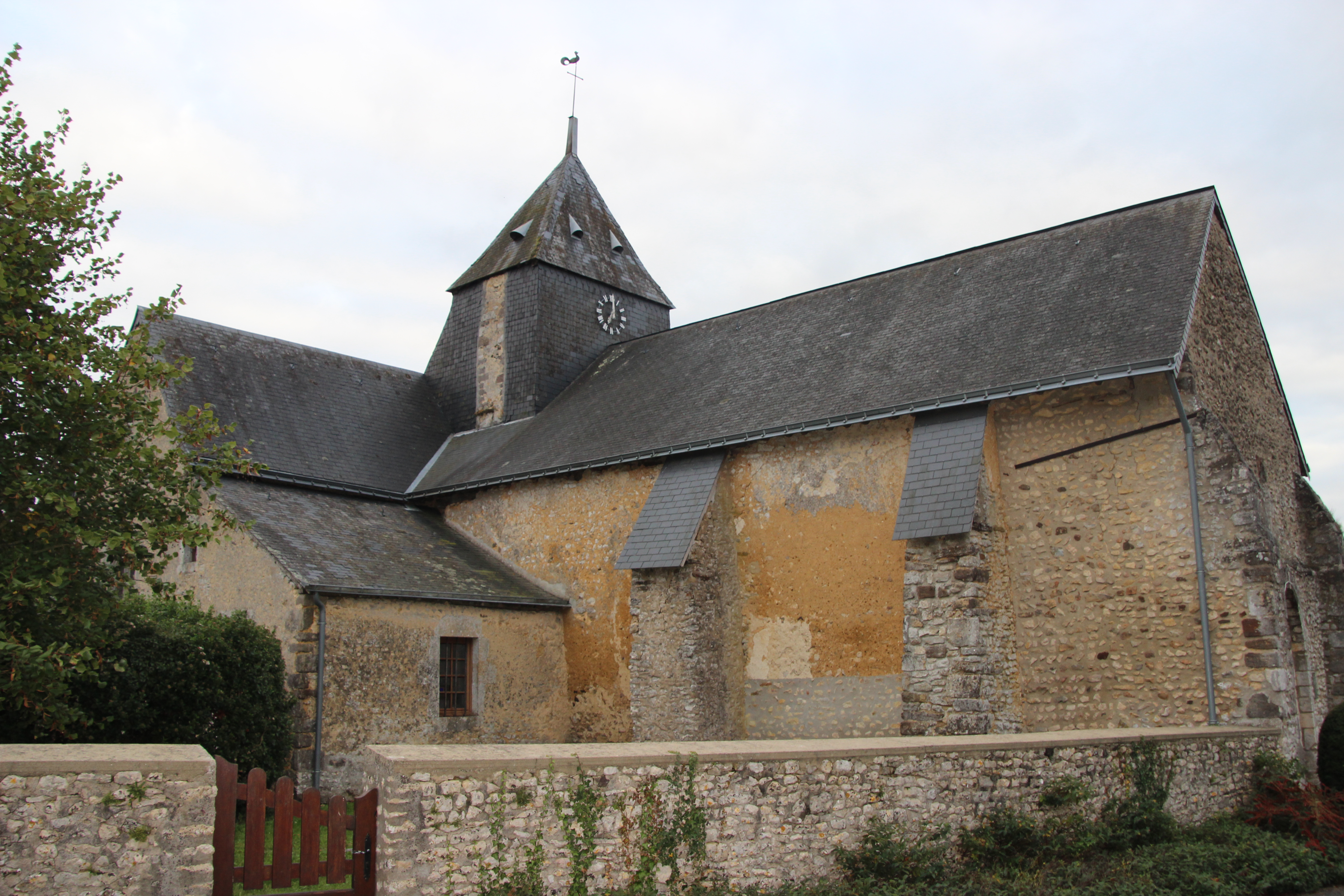 Église Saint-Martin de Tassillé [#100WikiCommonsDays r2 d84]